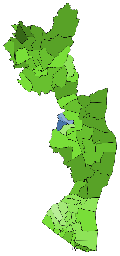 中文（台灣）: 顏色對照表